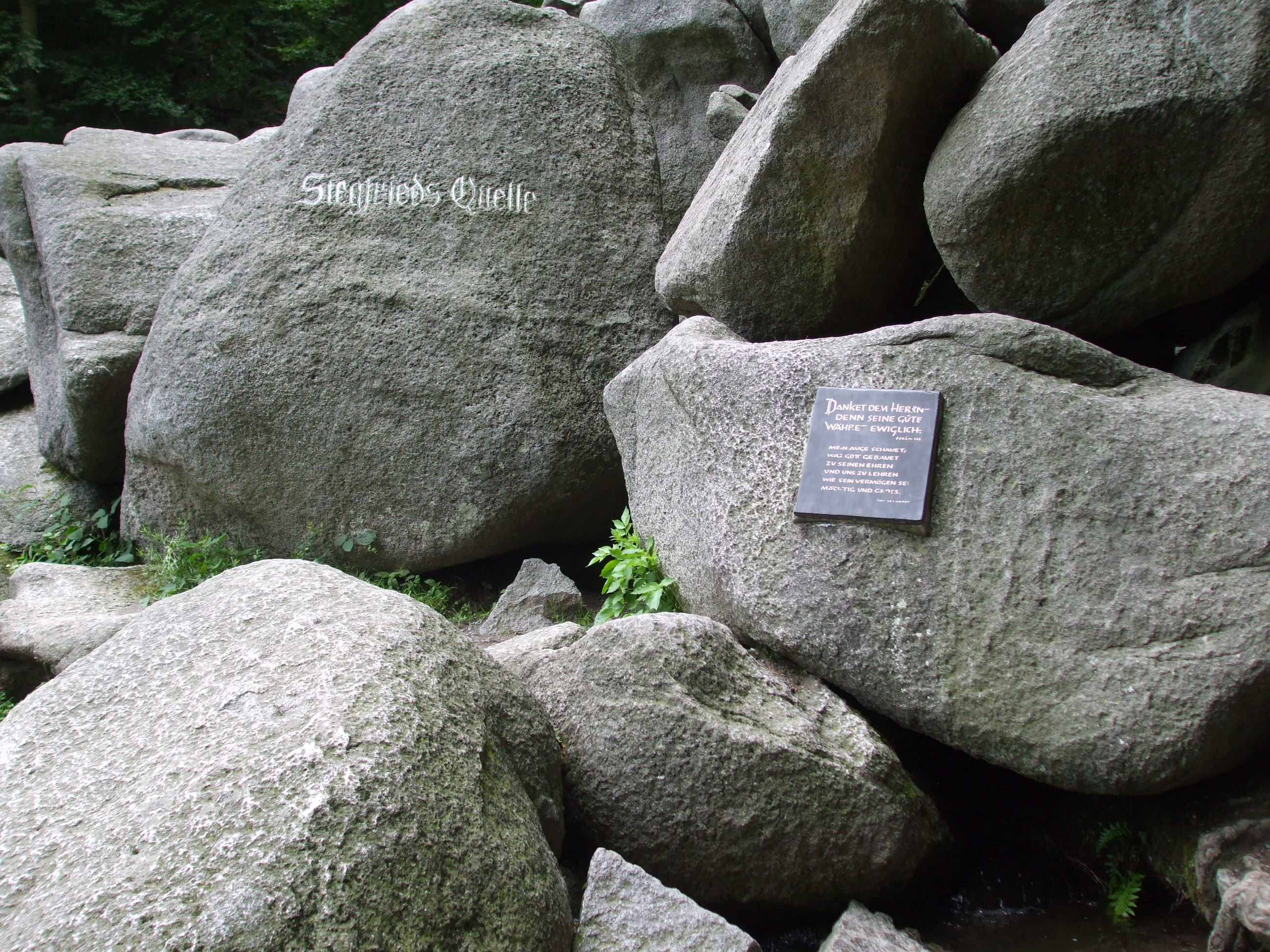 Siegfriedsquelle am Fuße des "Felsenmeeres" in Lautertal (Odenwald)/Reichenbach